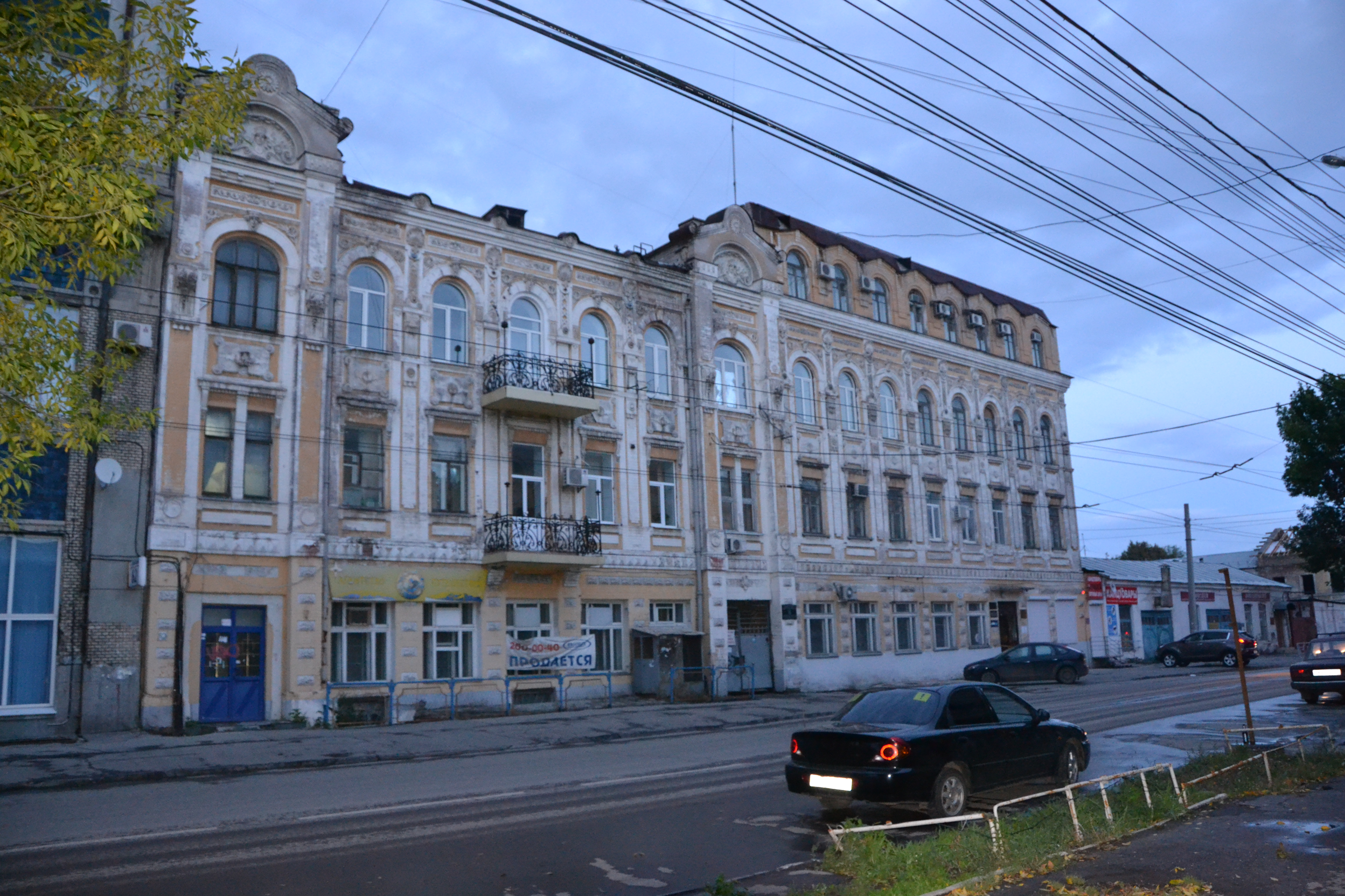 Торговый дом (Самарская область, Самара, Некрасовская улица, 62)